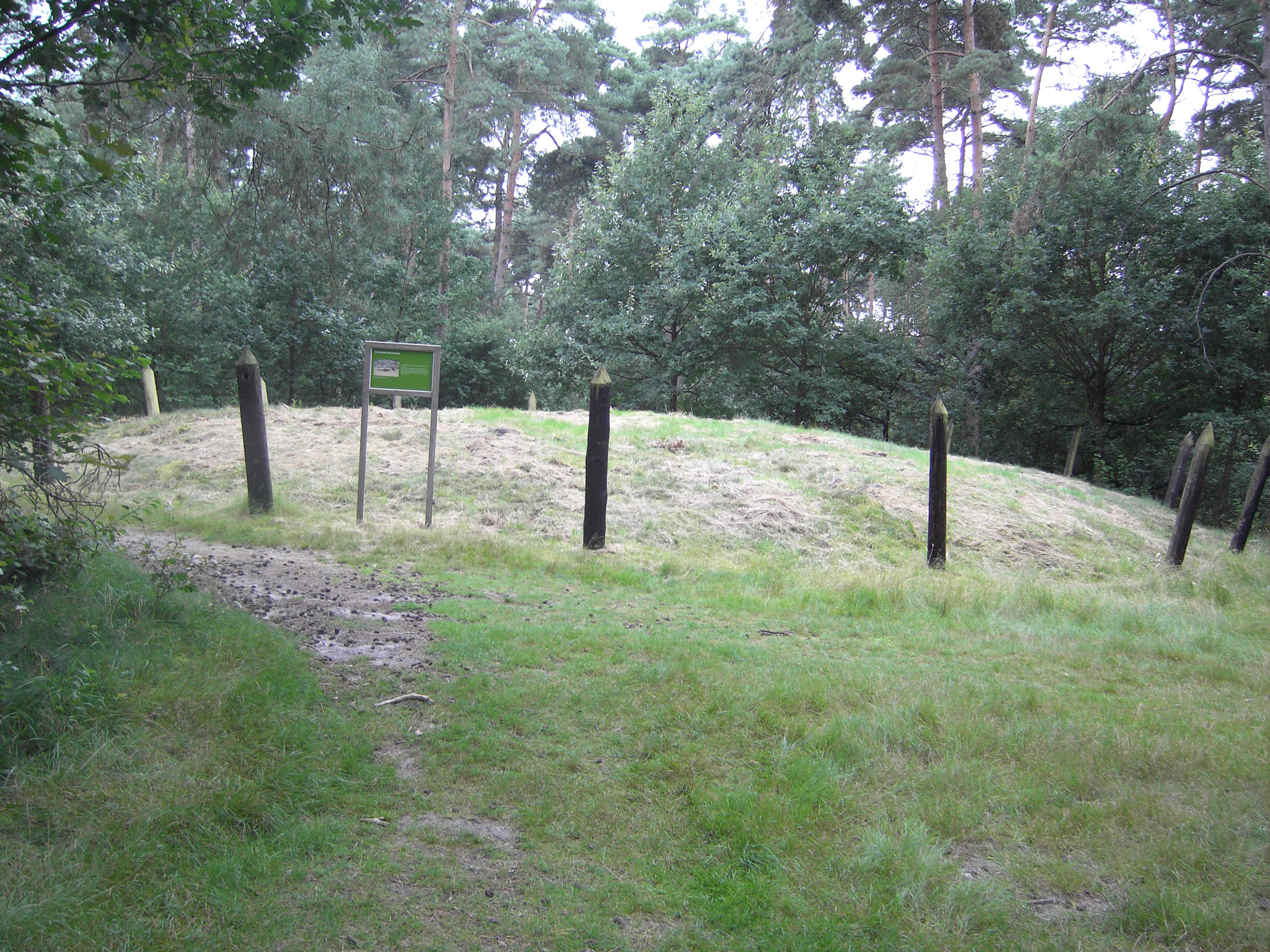 Hamont-Achel grafheuvel 1.400 voor Christus